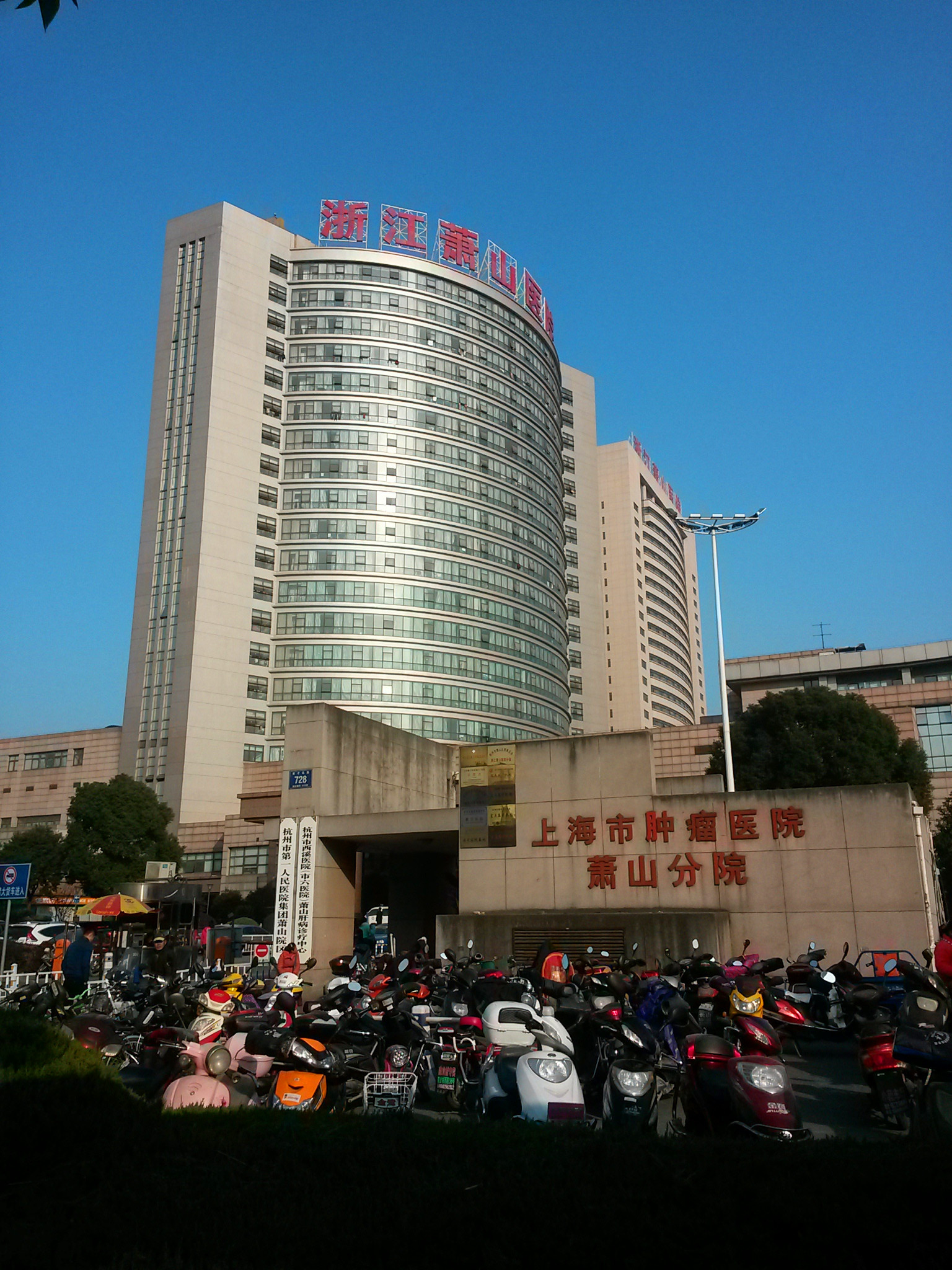 中文（中国大陆）: 浙江萧山医院